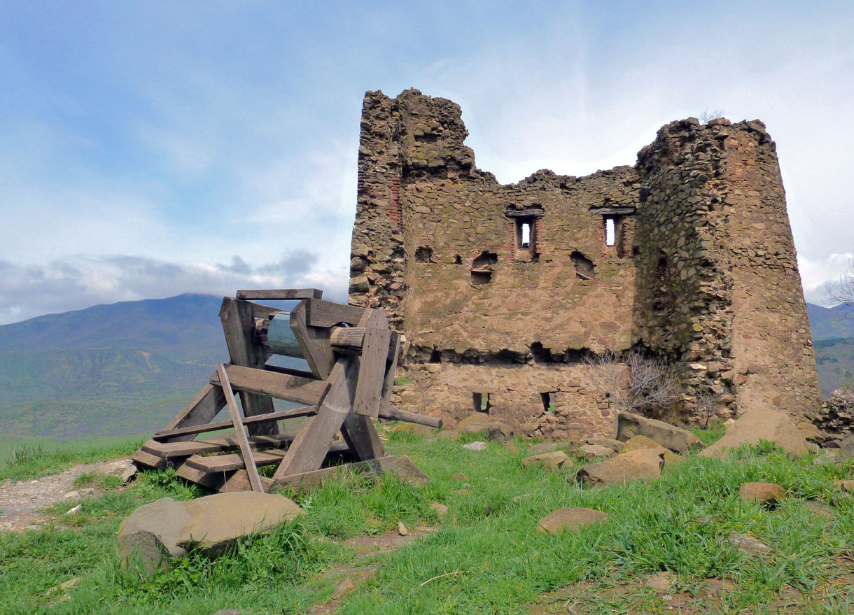 Jvari temple near Mzkheta Georgia